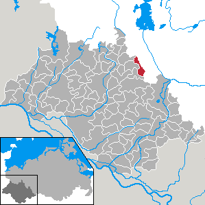 Lübesse in Mecklenburg-Vorpommern - district Ludwigslust